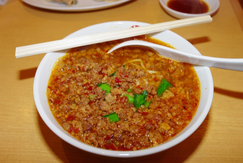 台湾ラーメン（愛知県常滑市中部国際空港セントレア1-1、ターミナルビル4F、ちょうちん横丁の「味仙」[1]空港店）、「名古屋名物、本場台湾にはないと言われる「味仙」の台湾ラーメン。中部国際空港は２回目だが２回とも食べてます。」